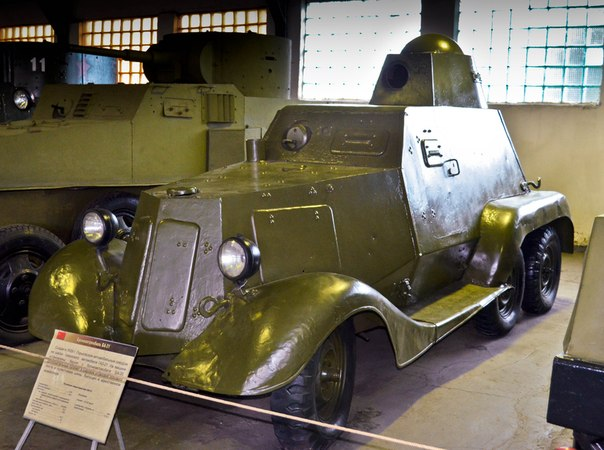 Опытный советский лёгкий БА-21